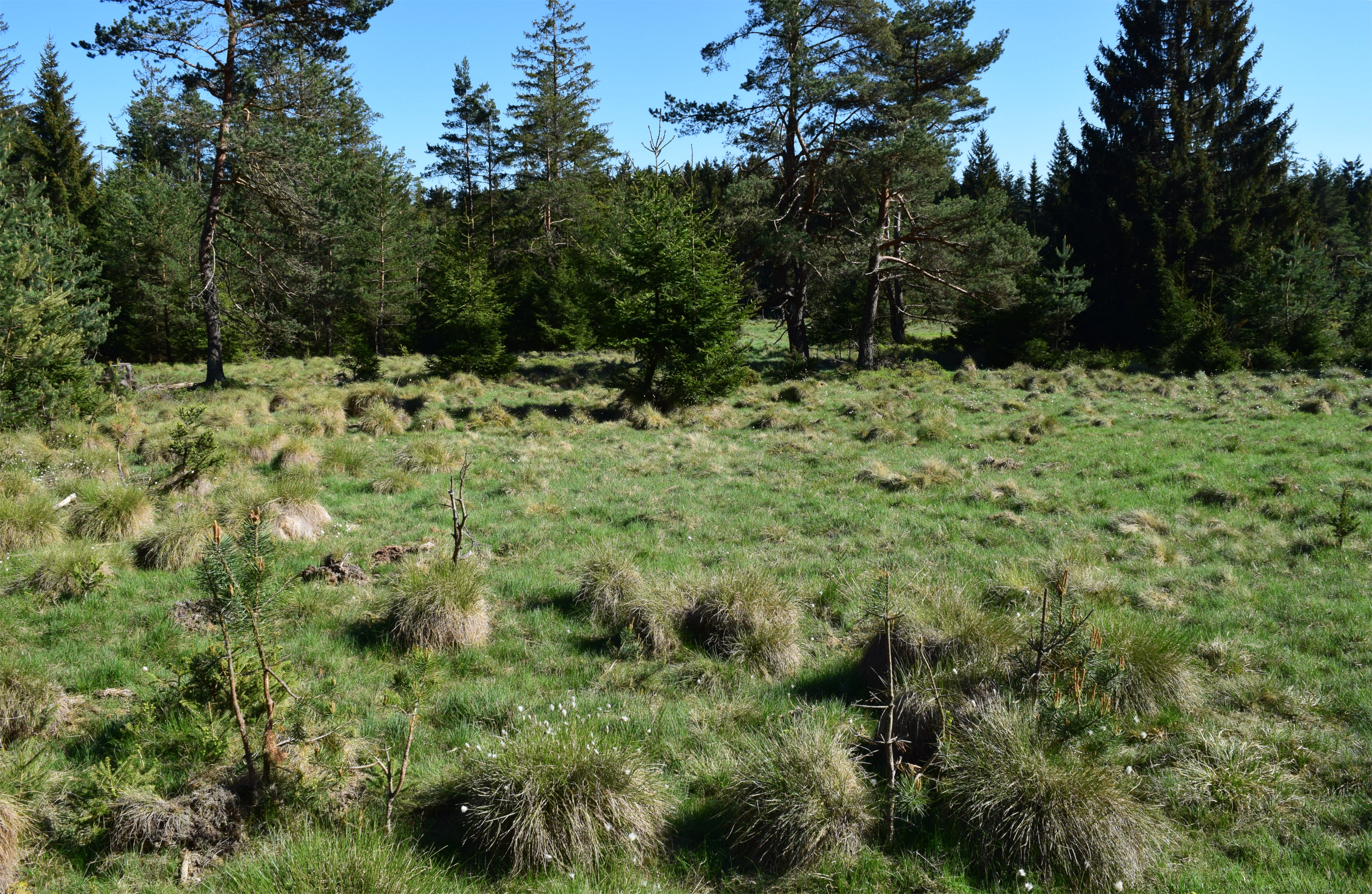 Moorgebiet bei Bärnau